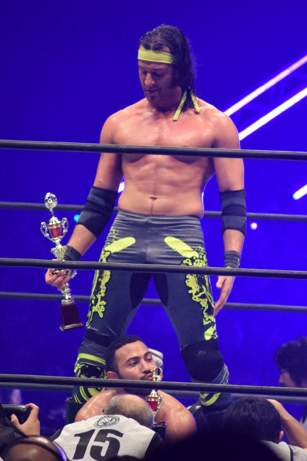 2016年11月5日 大阪府立体育会館「POWER STRUGGLE」 六本木ヴァイス（ロッキー・ロメロ & バレッタ）